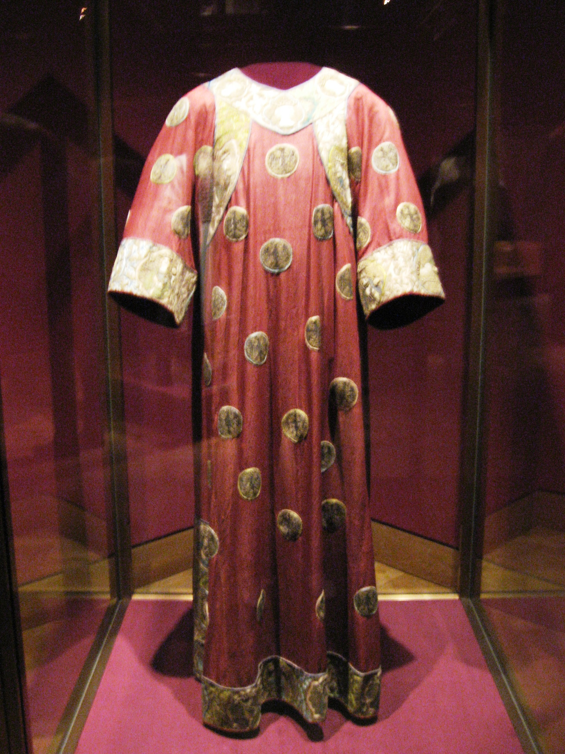 Adlerdalmatika. Süddeutsch, 1330-1340. Stoff: chinesisch, um 1300. Seidenkörperdamast, Gold- und Seidenstickerei, Glassteinchen. Inv. Nr. XIII 15.